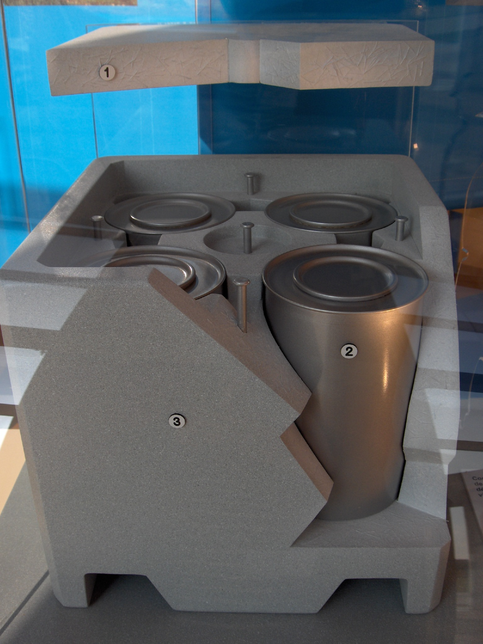 Présentation d'un conteneur d'entreposage ou de stockage au Laboratoire de recherche souterrain de Meuse/Haute-Marne à Bure. Il est destiné à recevoir des déchets de moyenne activité à vie longue (déchets B). Il mesure 1,5 m de côté. Son poids est d'environ 6,8 tonnes. Légende : 1) Couvercle en béton fibré 2) Colis primaire en acier inox 3) Colis en béton fibré Il est destiné aux colis primaires de type B2.1.